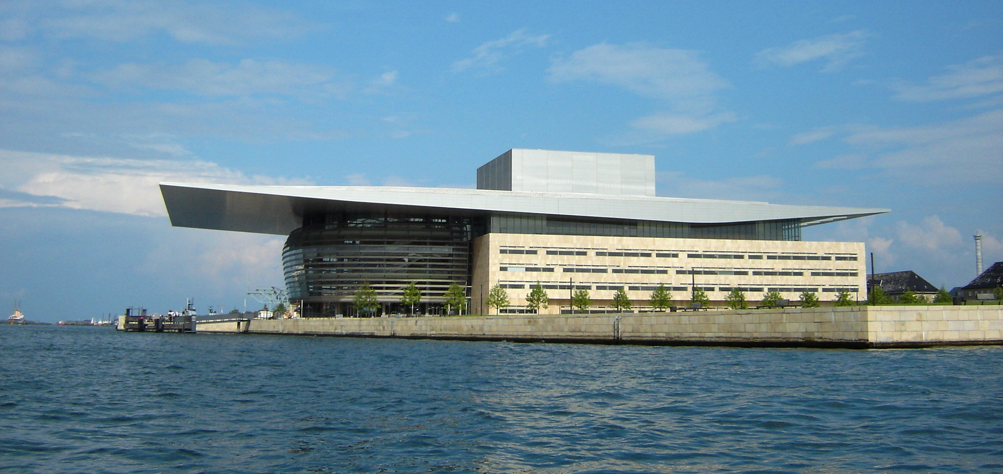 Operahuis te Kopenhagen.